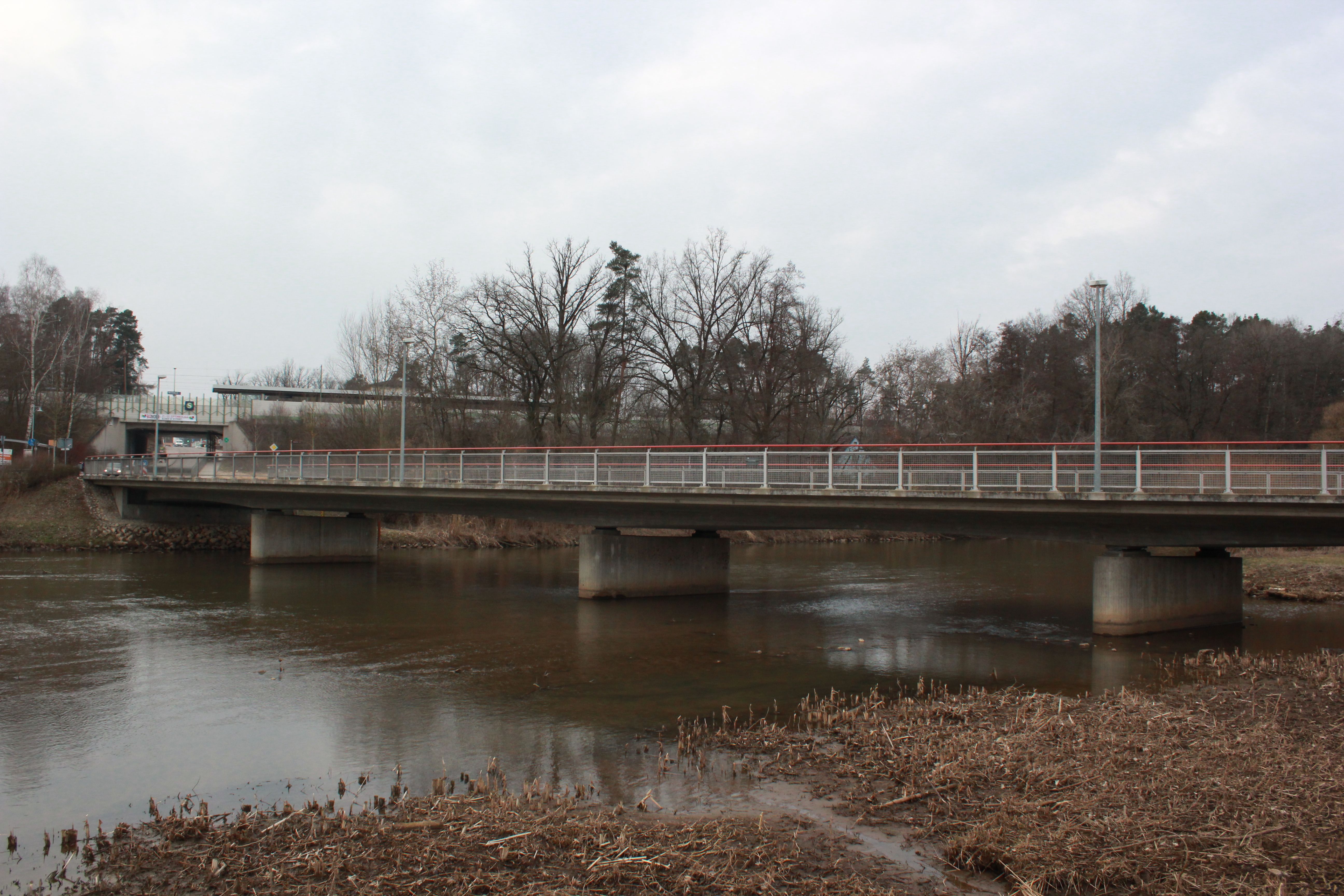 Büchenbach Brücke über Rednitz